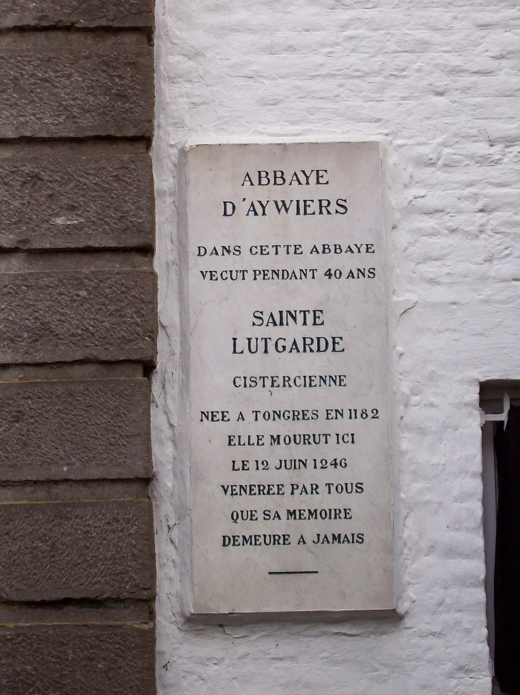 Plaque commémorative de Sainte Lutgarde, fixée sur la portail de l'ancienne abbaye d'Aywiers, en Belgique